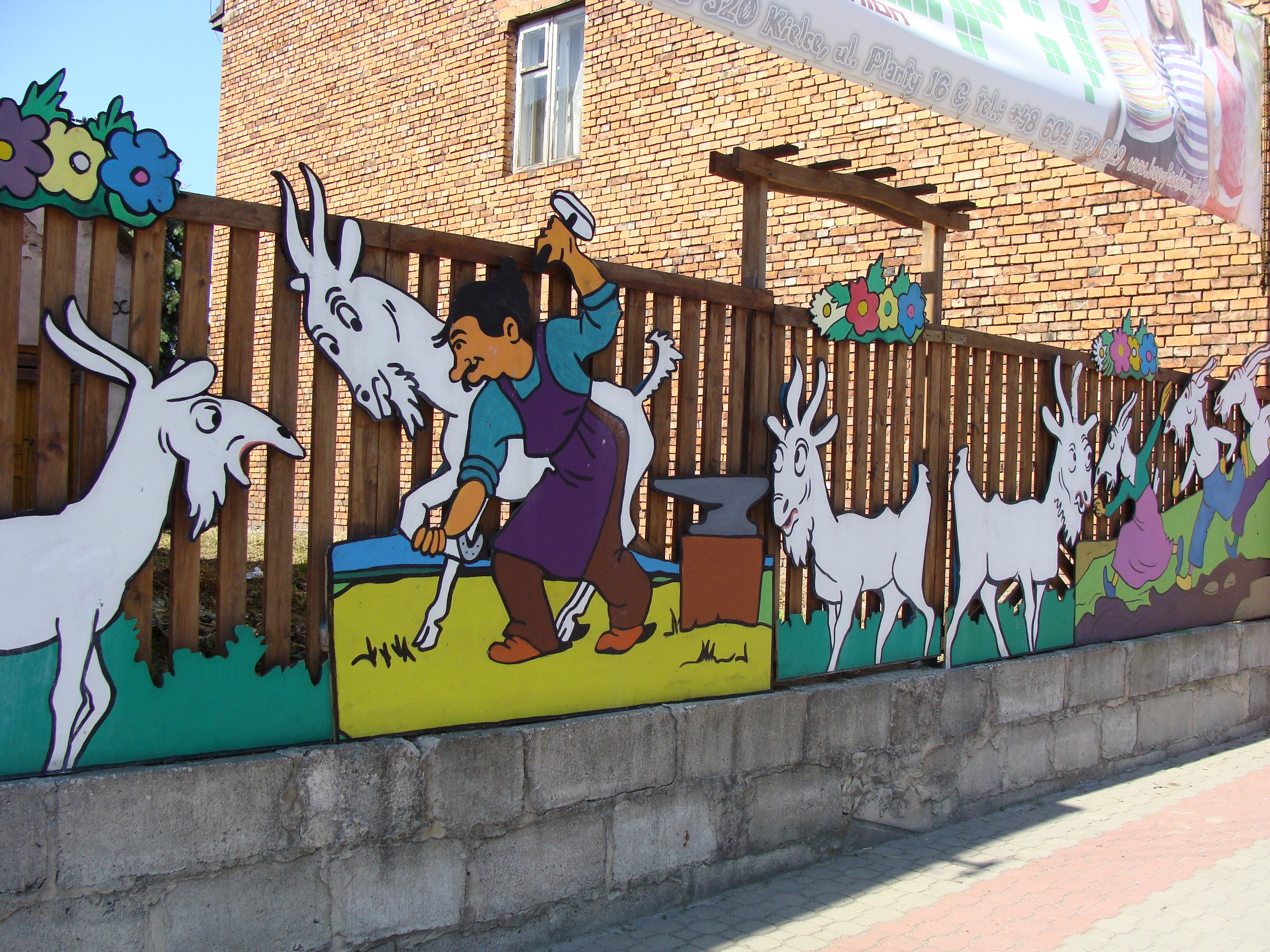 Koziołek Matołek w Pacanowie